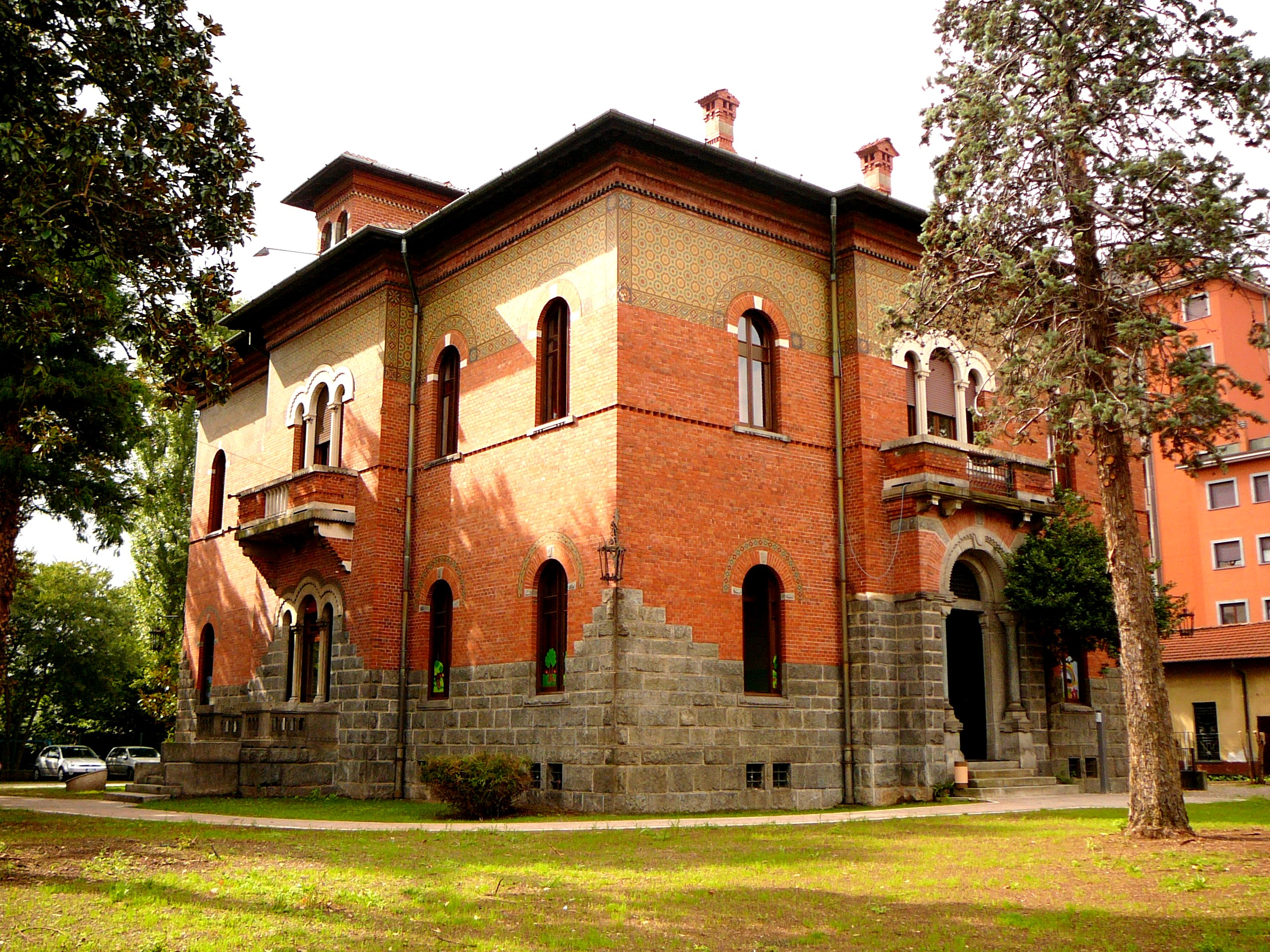 costruita nel 1923 per Ercole Comerio oggi è di proprietà del Comune di Busto Arsizio ed ospita una scuola materna